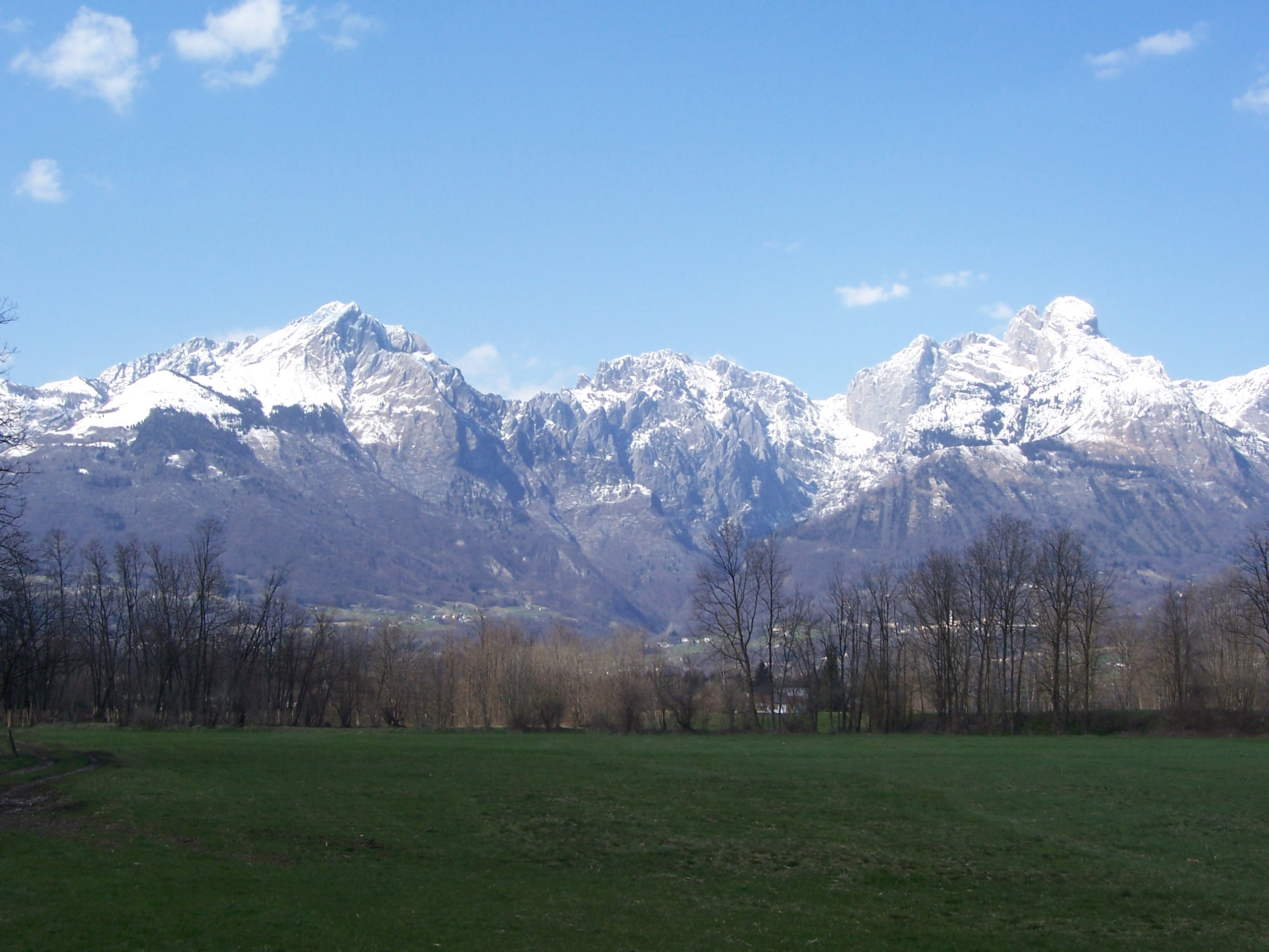 Il Gruppo del Pizzocco visto dalla Val Belluna